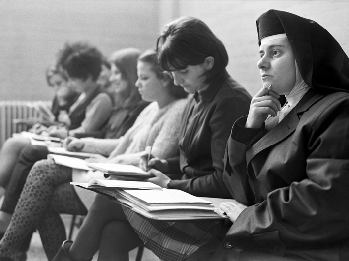 אוניברסיטת חיפה